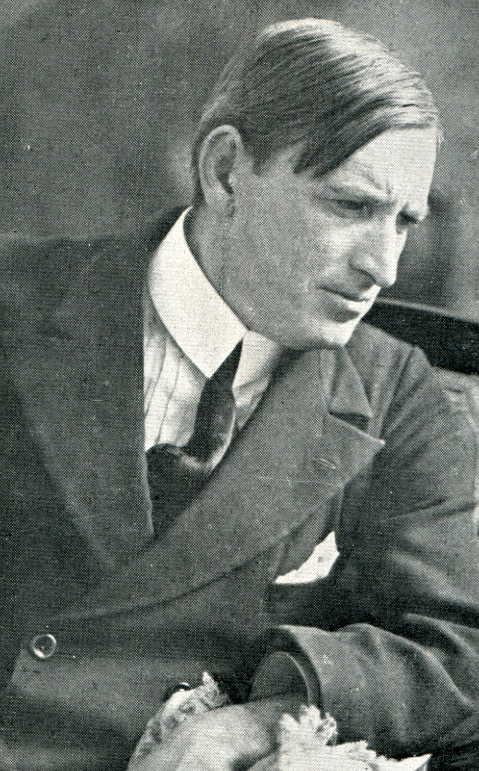 I regista Ugo Falena (1875 - 1931) in una immagine del 1919